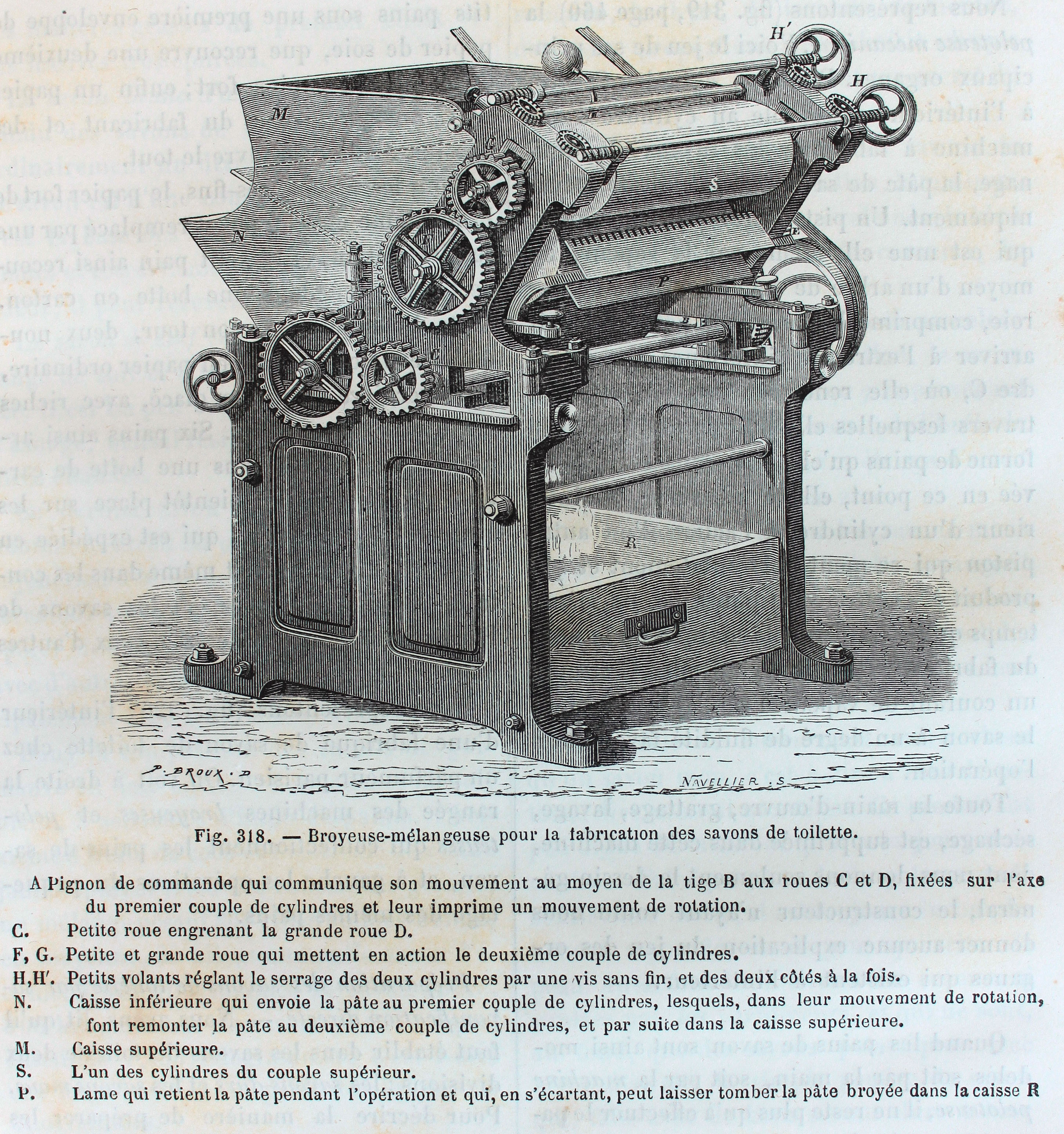 Ilustraciones de la obra : Les merveilles de l'industrie ou, Description des principales industries modernes / par Louis Figuier. - Paris : Furne, Jouvet, [1873-1877]. - Tome I